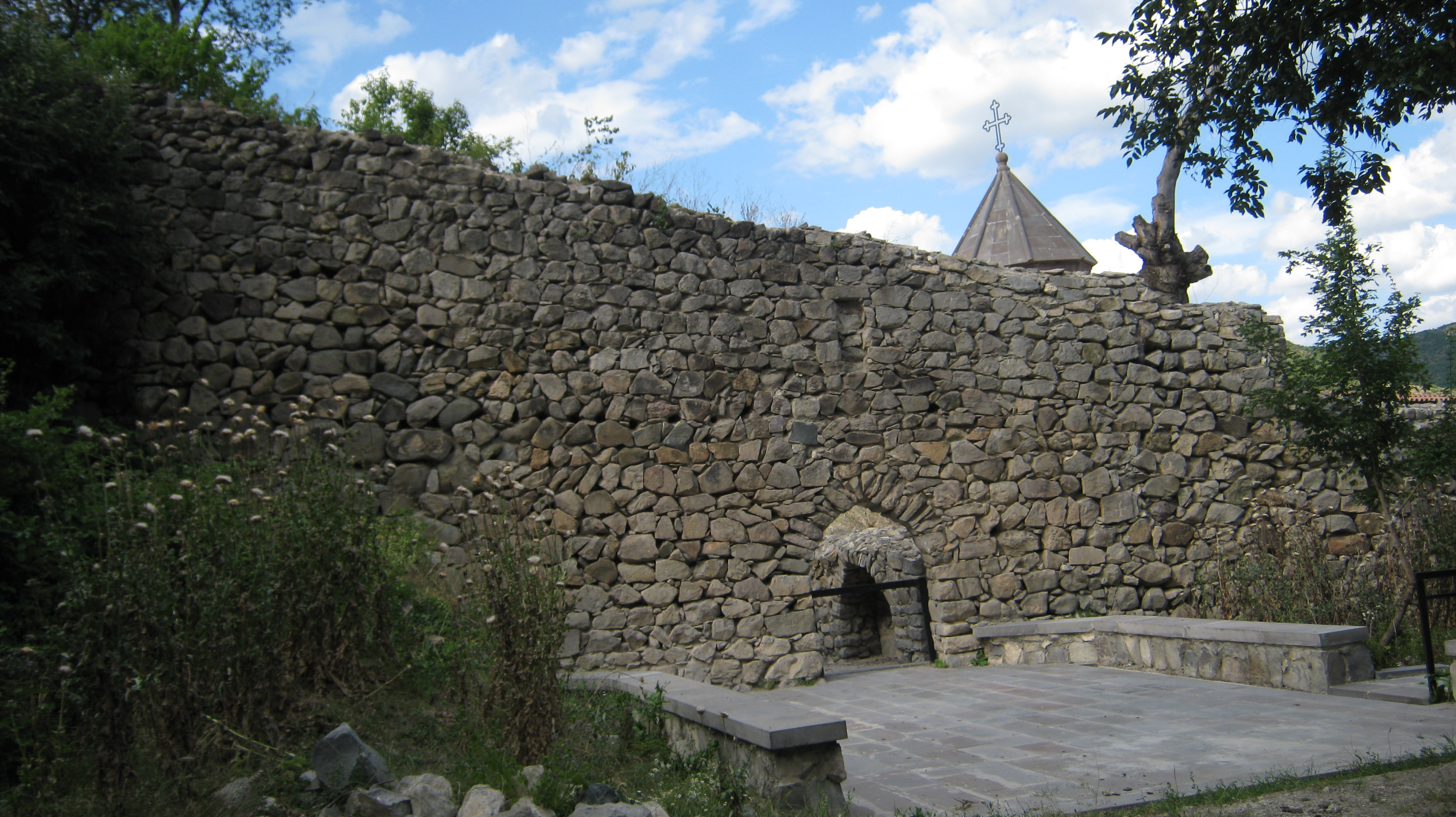 Ամրոց Հալիձոր (Հալիձորի բերդ) 1/8.1